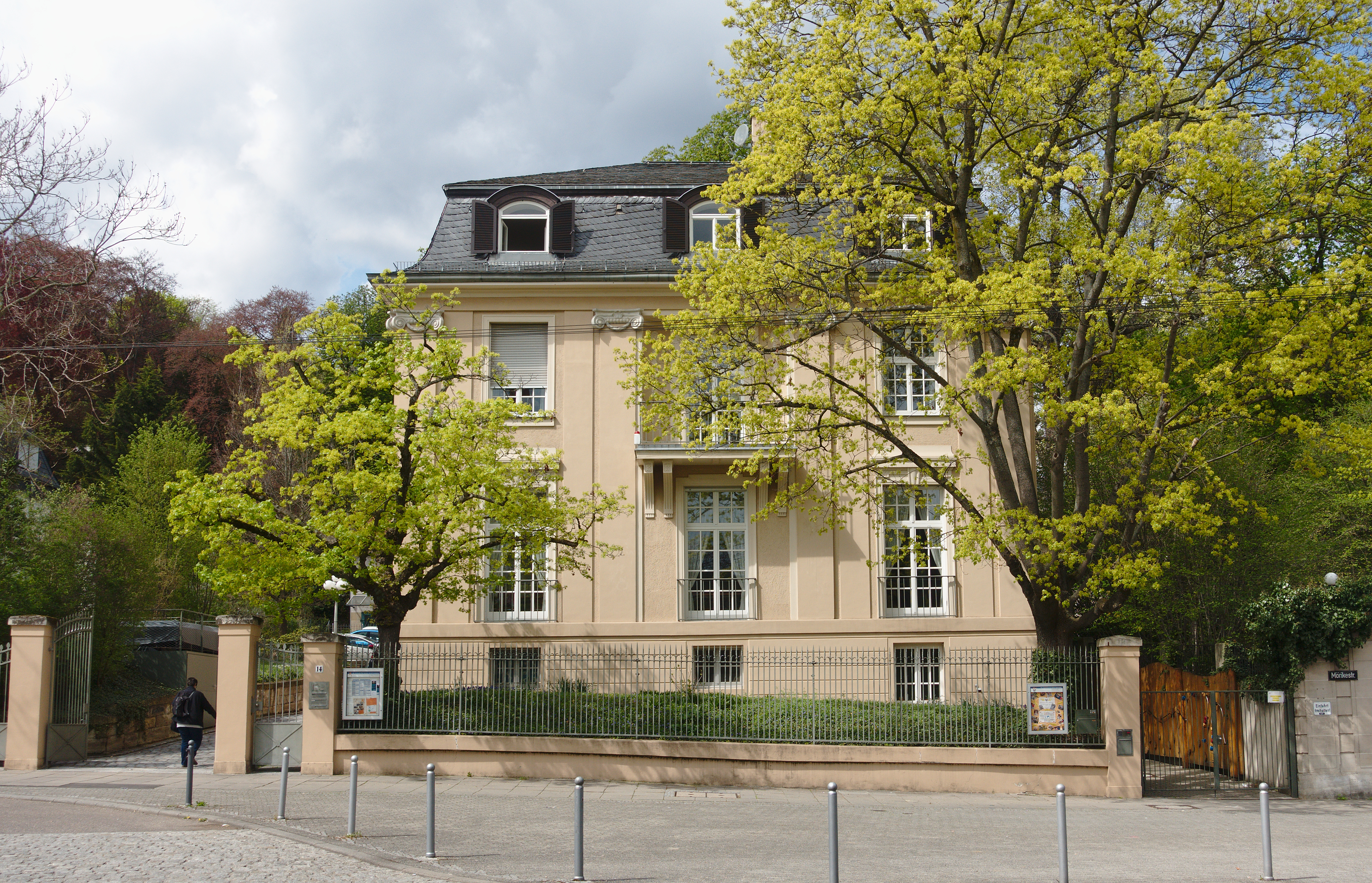 Ehemalige Villa Kaulla nebst Remisen- und Wohngebäude (Sachgesamtheit), Mörikestraße 14, Stuttgart. Erbaut 1910 von Schlösser und Weirether für Rudolf Kaulla (1872–1954). Geschützt nach § 2 DSchG